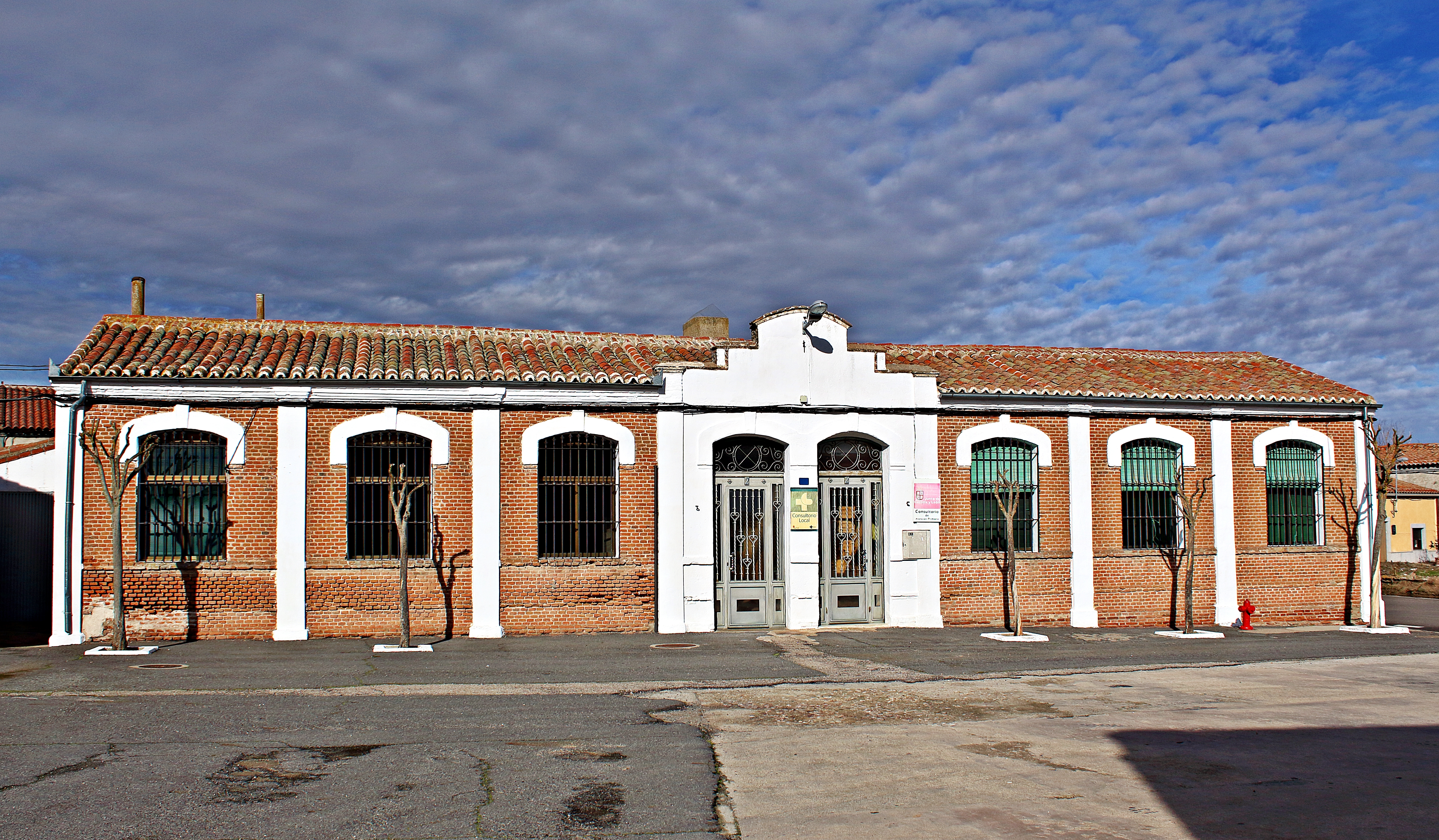 El Campo de Peñaranda municipio de la comarca Tierra de Peñaranda, provincia de Salamanca.